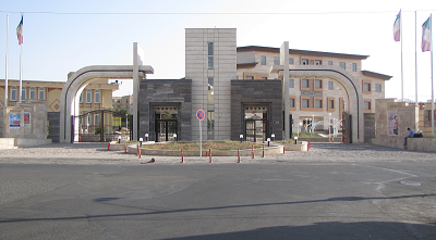 سردرب دانشگاه پیام نور مرکز زنجان